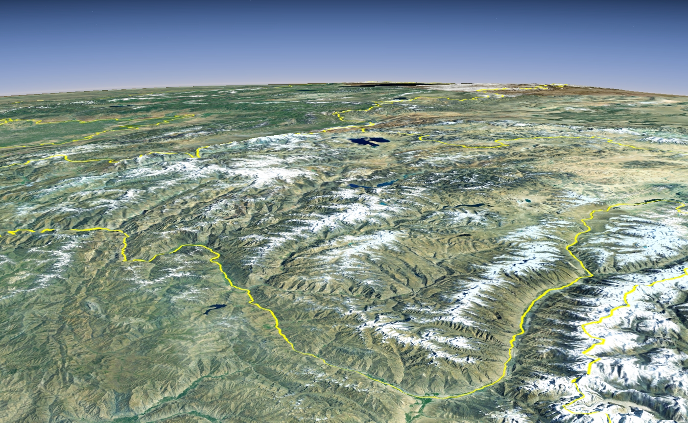 Le Pamir.